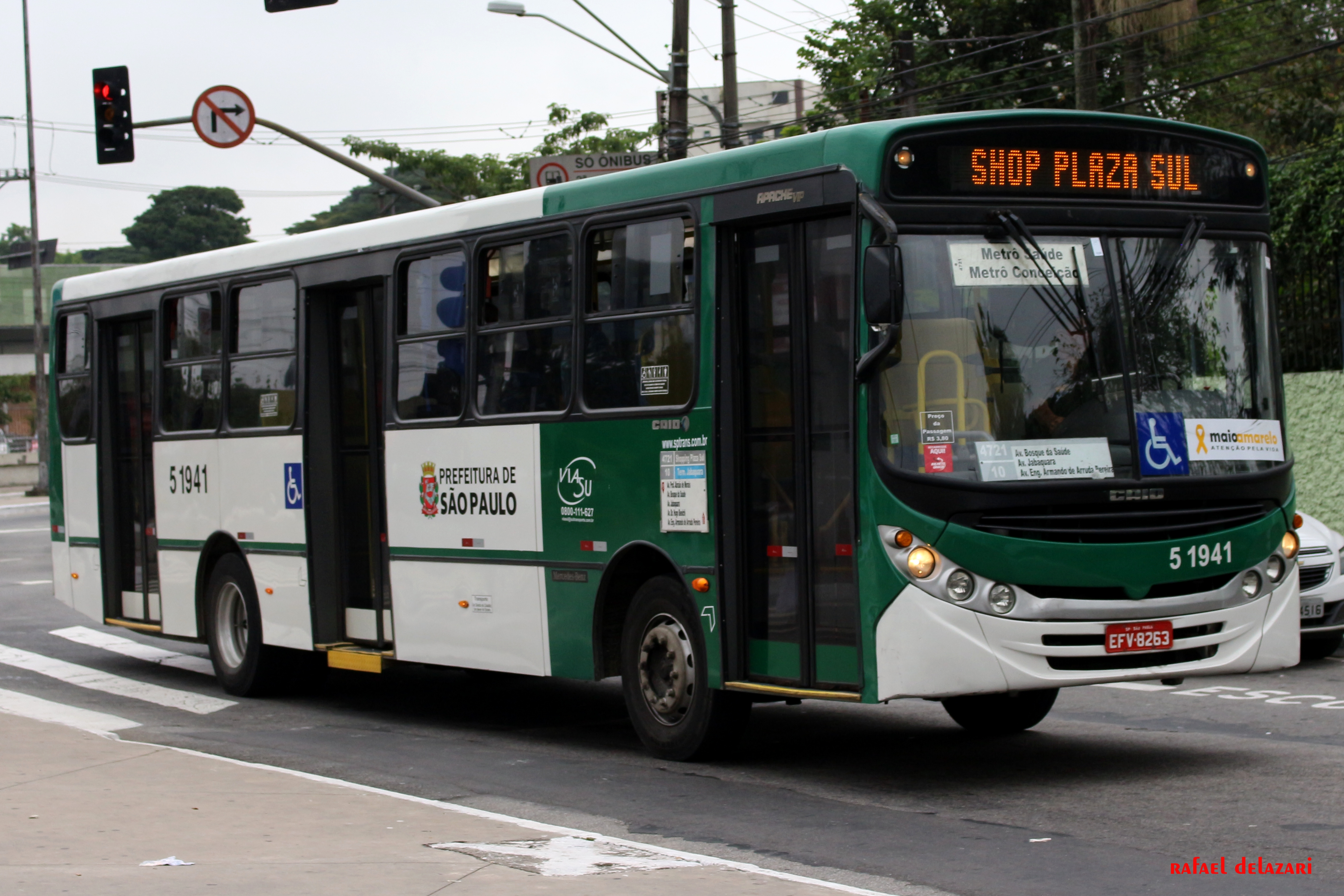 Via Sul - 5 1941